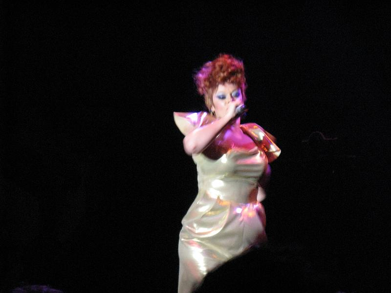 lady miss kier singing